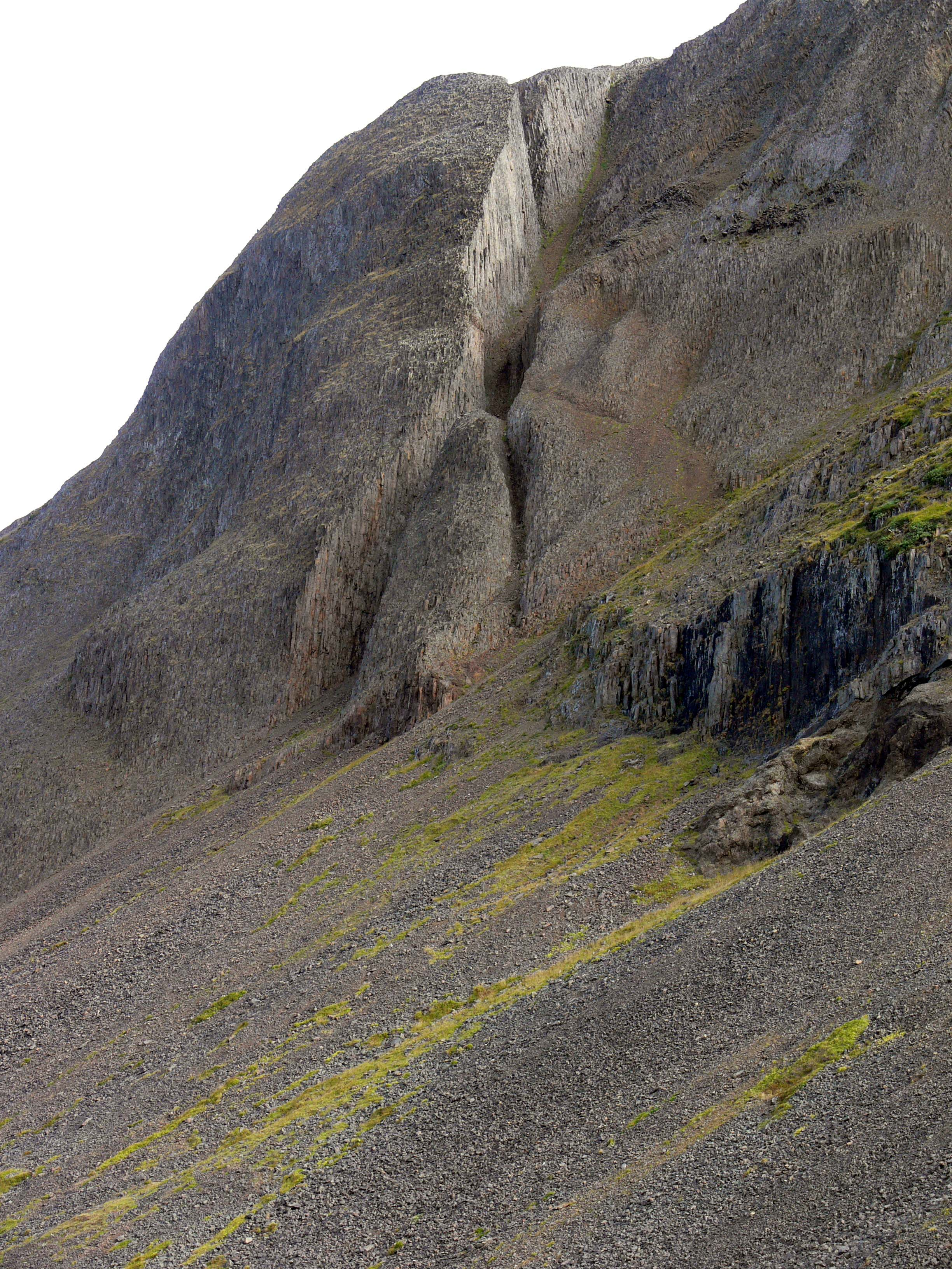 Vatnsdalur. Geröllhänge des Vatnsdalsfjall.